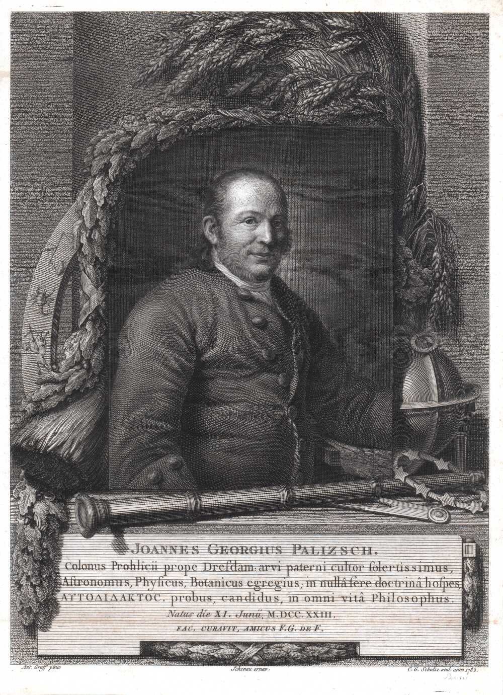 Astronomer Palitzsch